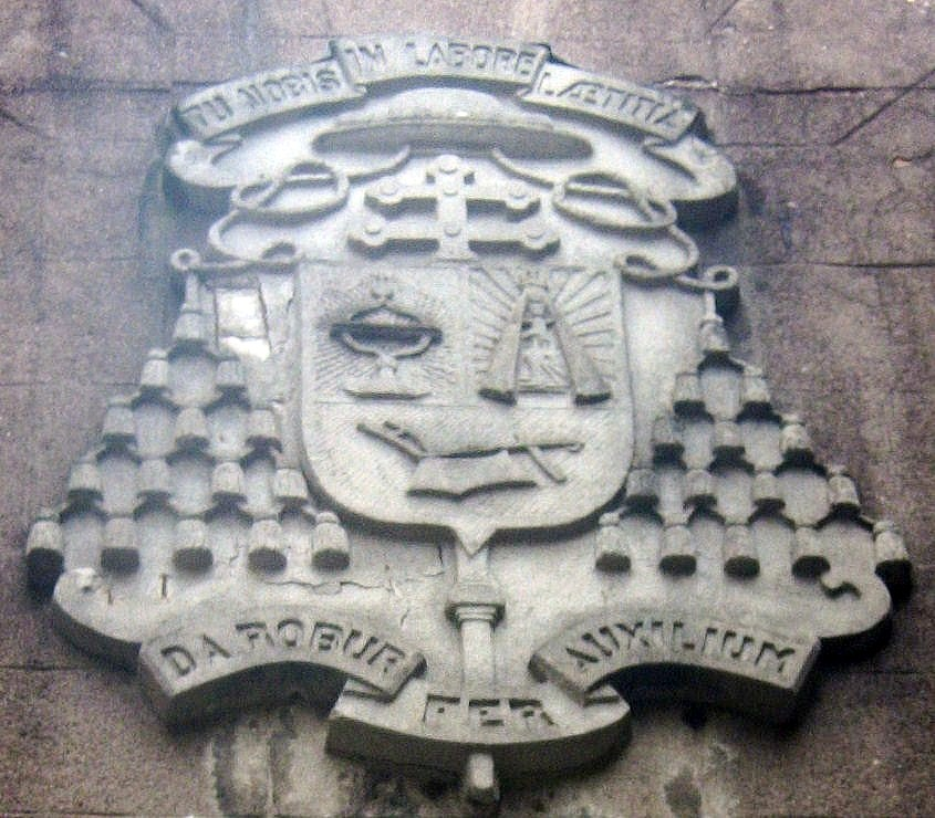 Une plaque Armorial d'un cardinal sur le grand séminaire de Besançon (Doubs, France).